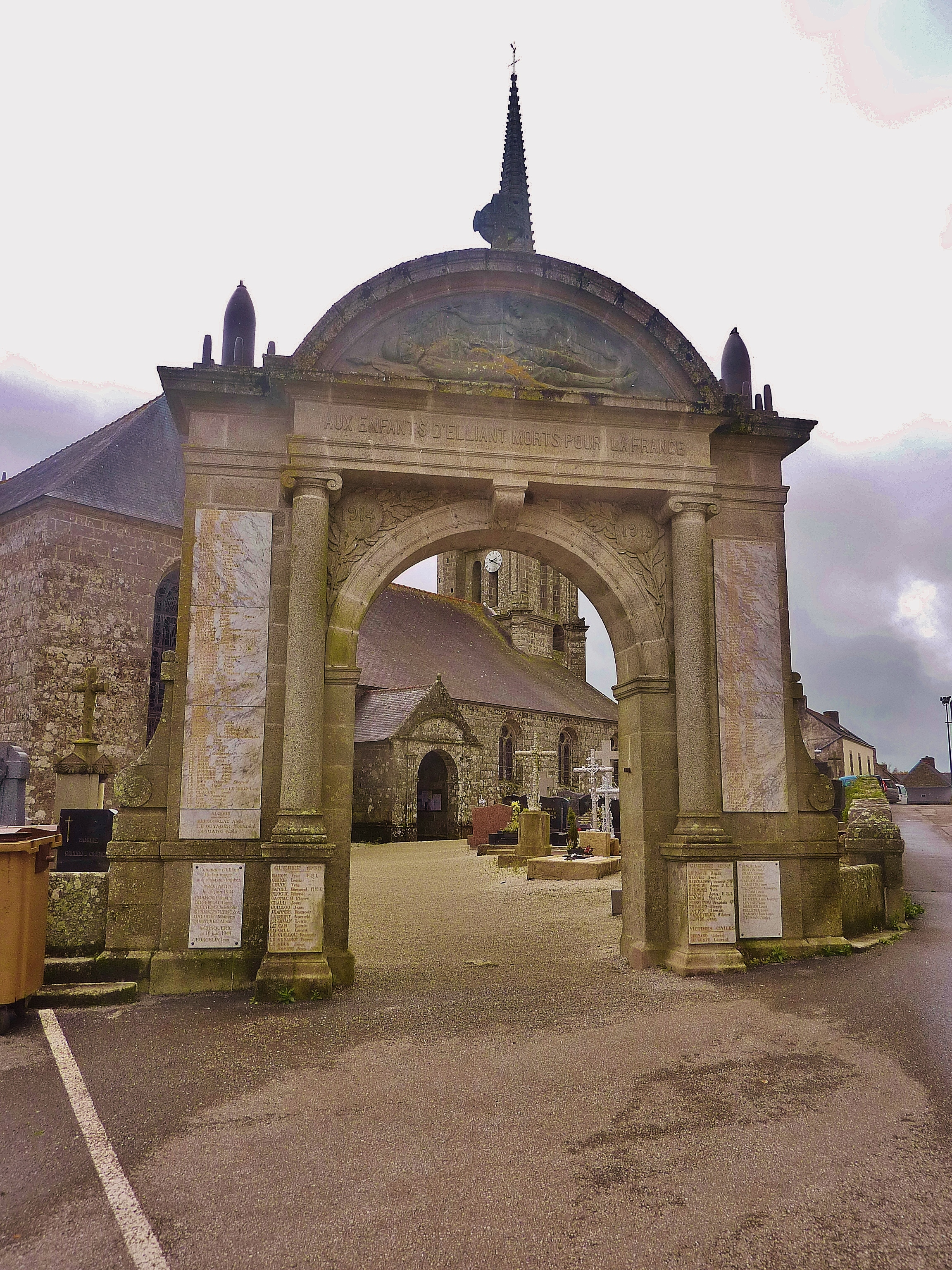 Le monument aux morts d'Elliant (qui est aussi une porte triomphale donnant accès à l'enclos paroissial).